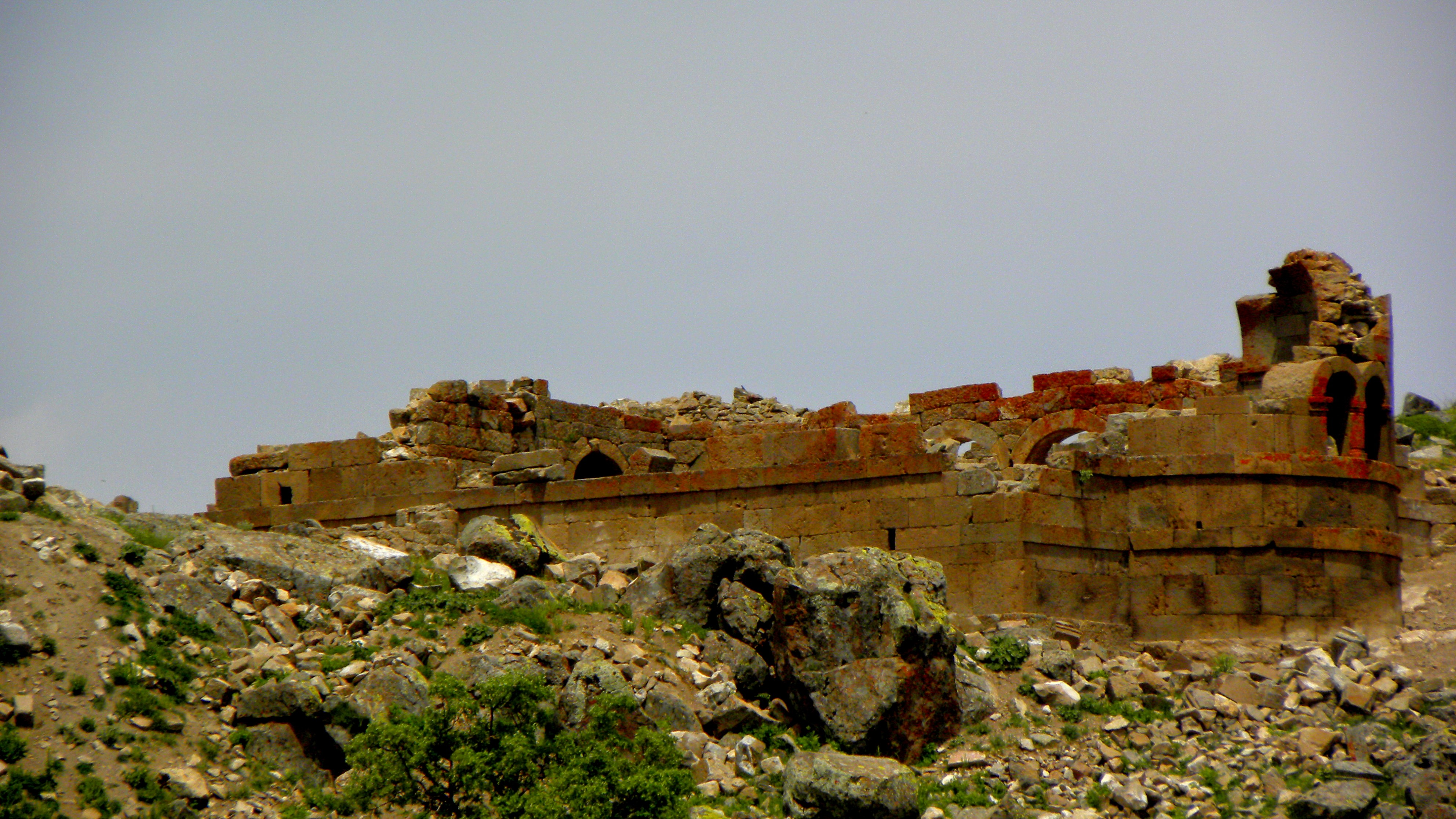 70000 Üçkuyu/Karaman Merkez/Karaman, Turkey